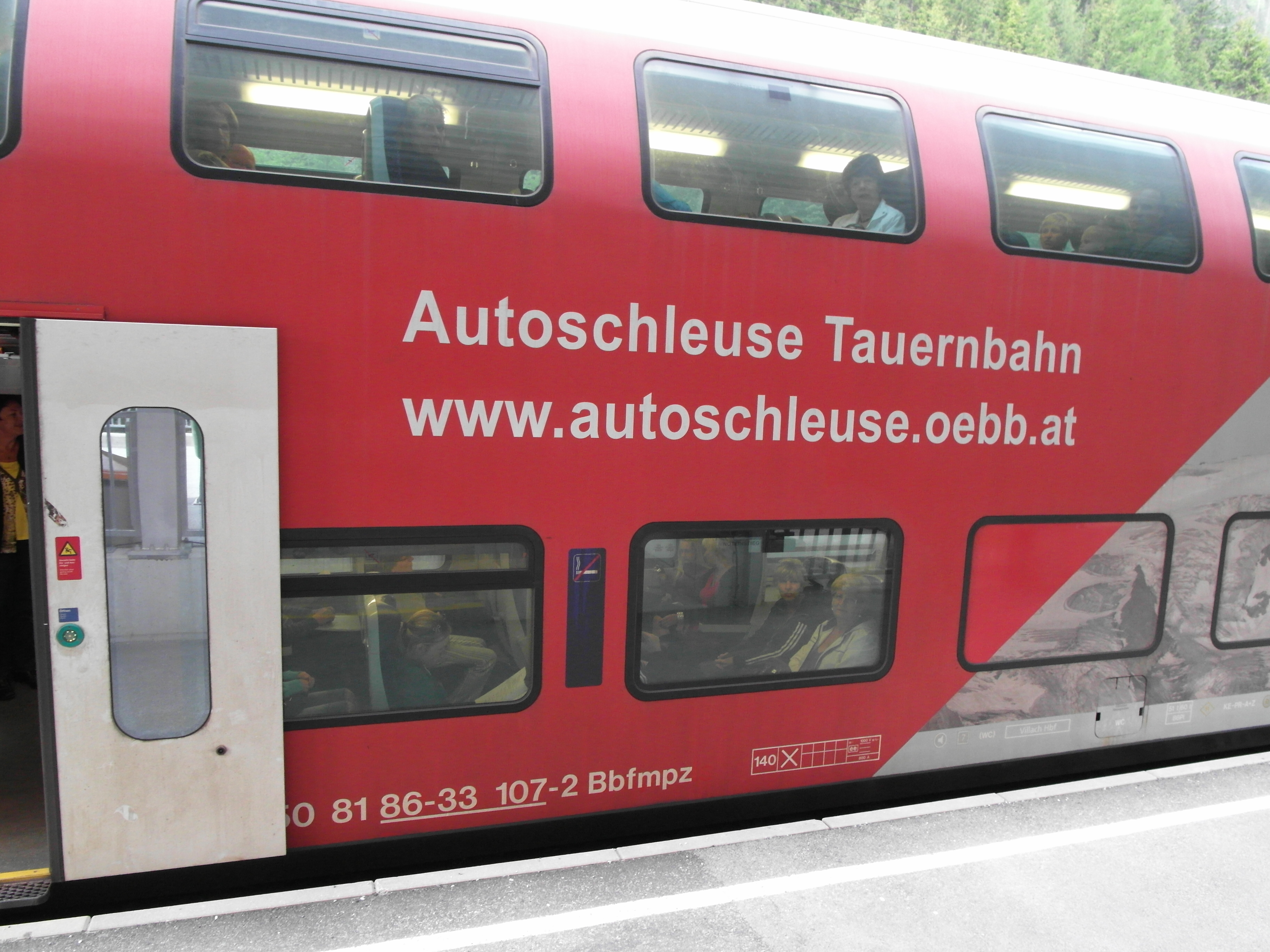 Doppelstockzug zur Personenbeförderung